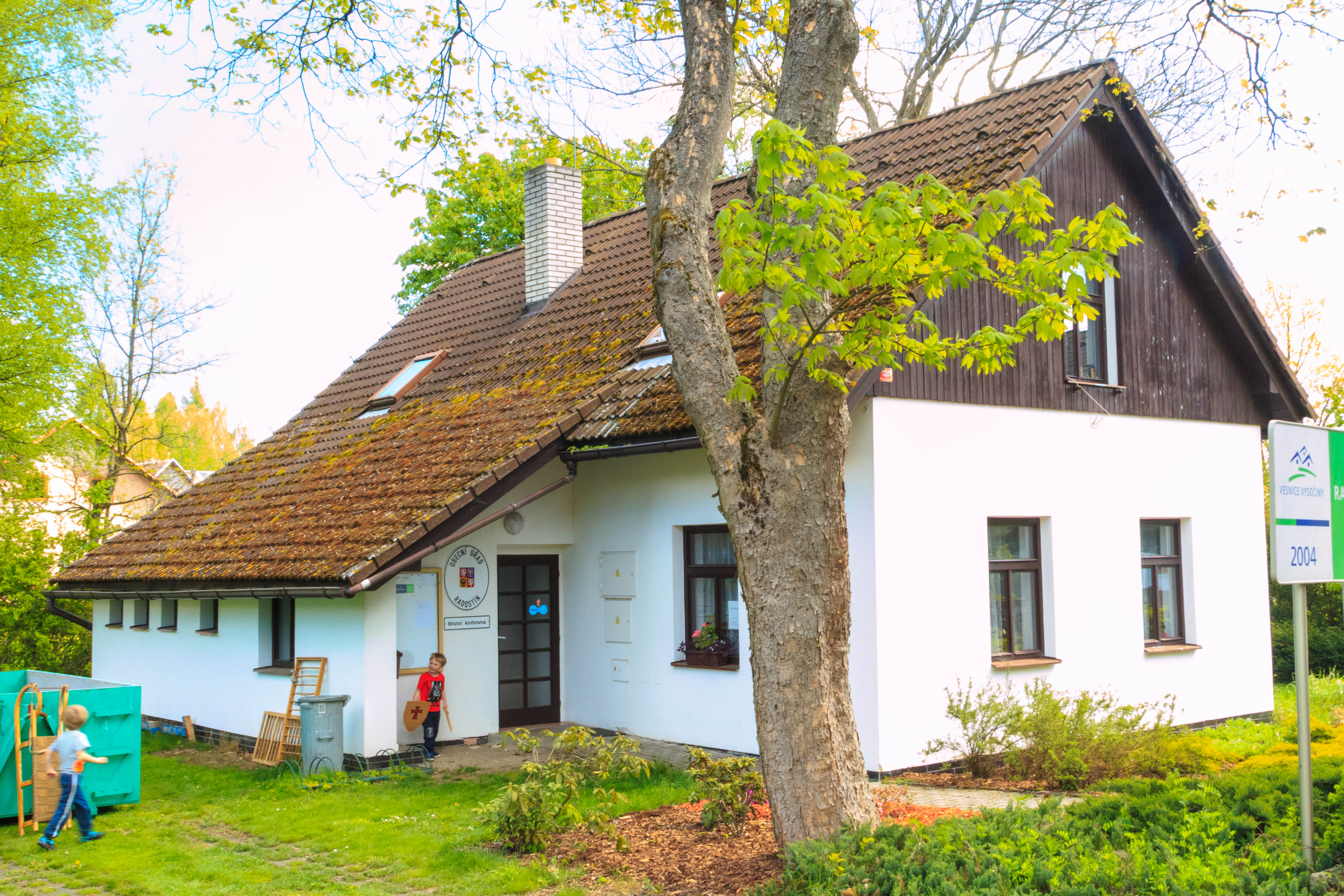 Radostín obecní úřad